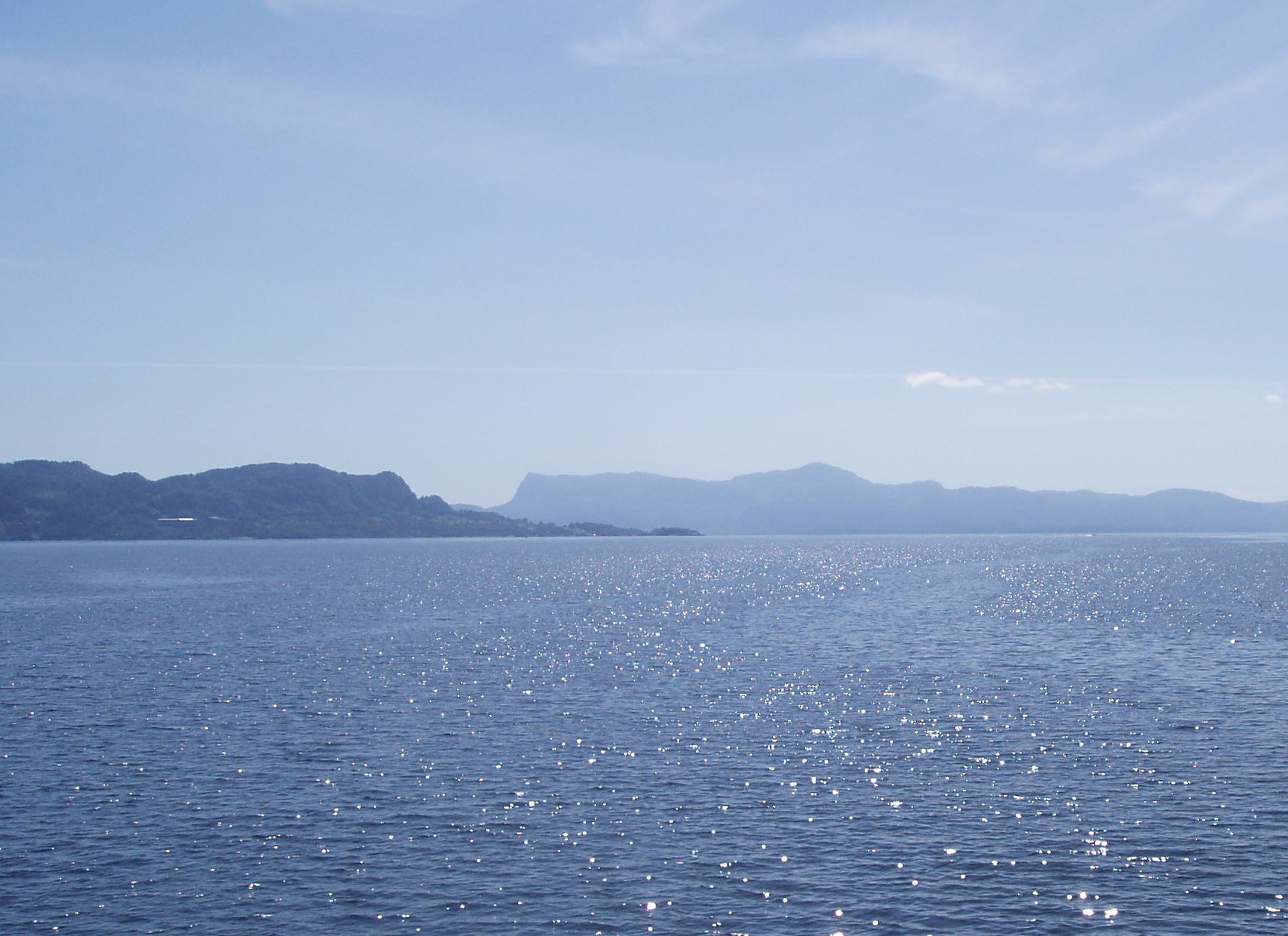 Fusafjorden looking southwards towards Bjørnafjorden and Tysnes.